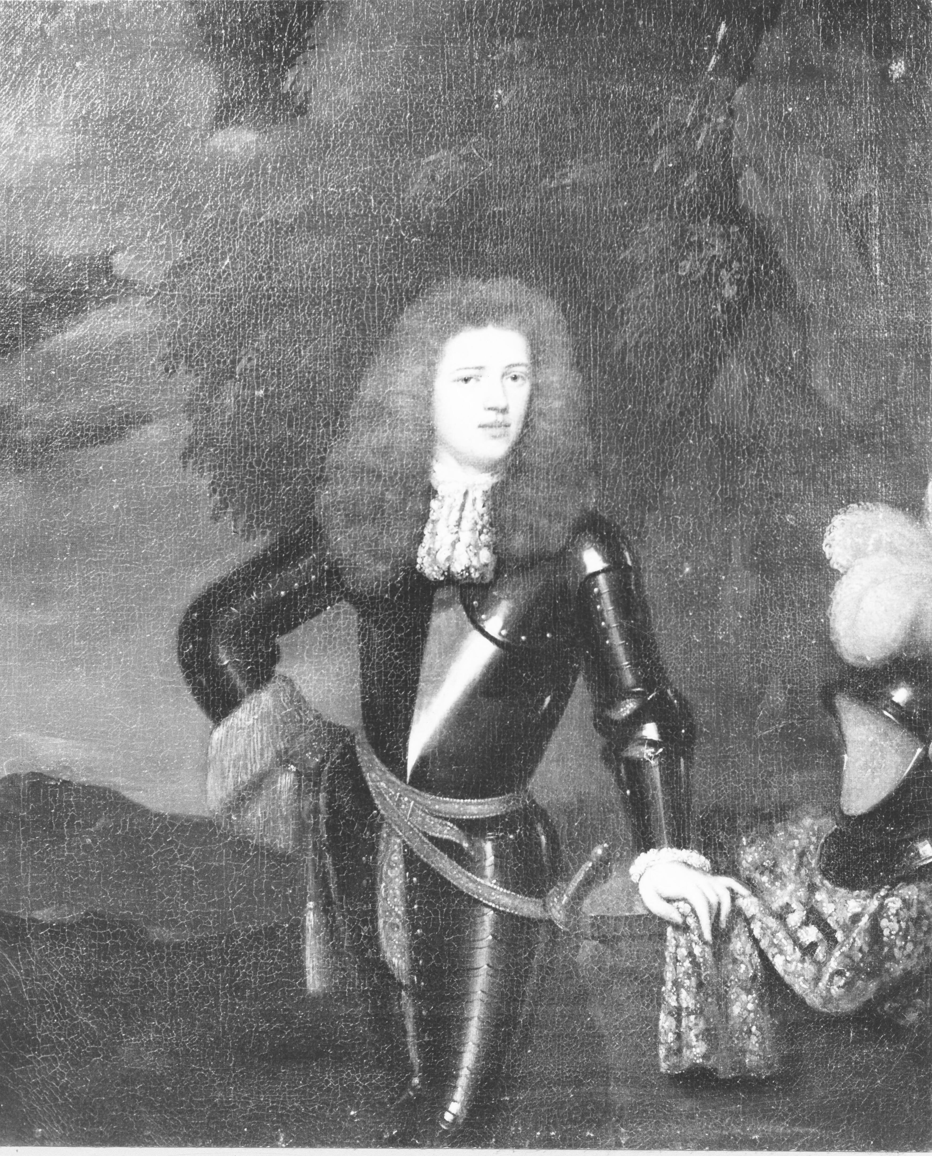 Wigbold Aldringa (1665-1743). Kocht in 1724 de Fromaborg en in 1734 de borg Rusthoven. Was heer van Wirdum, Loppersum, Ten Boer, Sint-Annen en Westerdeel-Langewold (Langewold ten westen van het Wolddiep). Hij was de kapitein van een compagnie infanterie tussen 1710 en 1728.